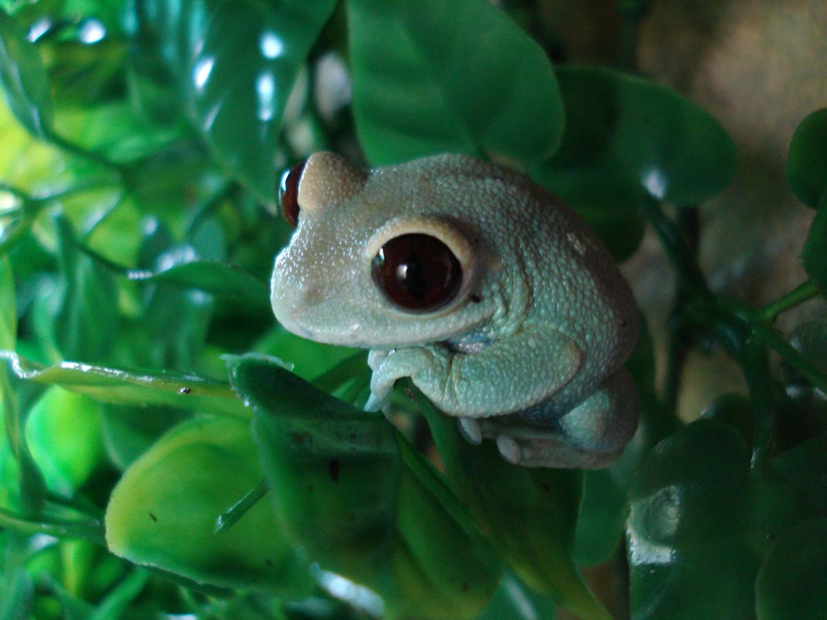 Adulte male Leptopelis uluguruensis